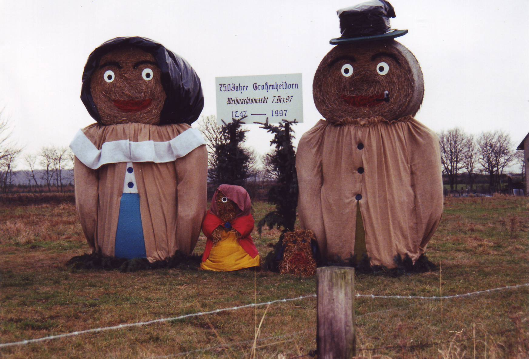 Strohpuppen zur 750-Jahrfeier am Ortseingang von Großenheidorn.